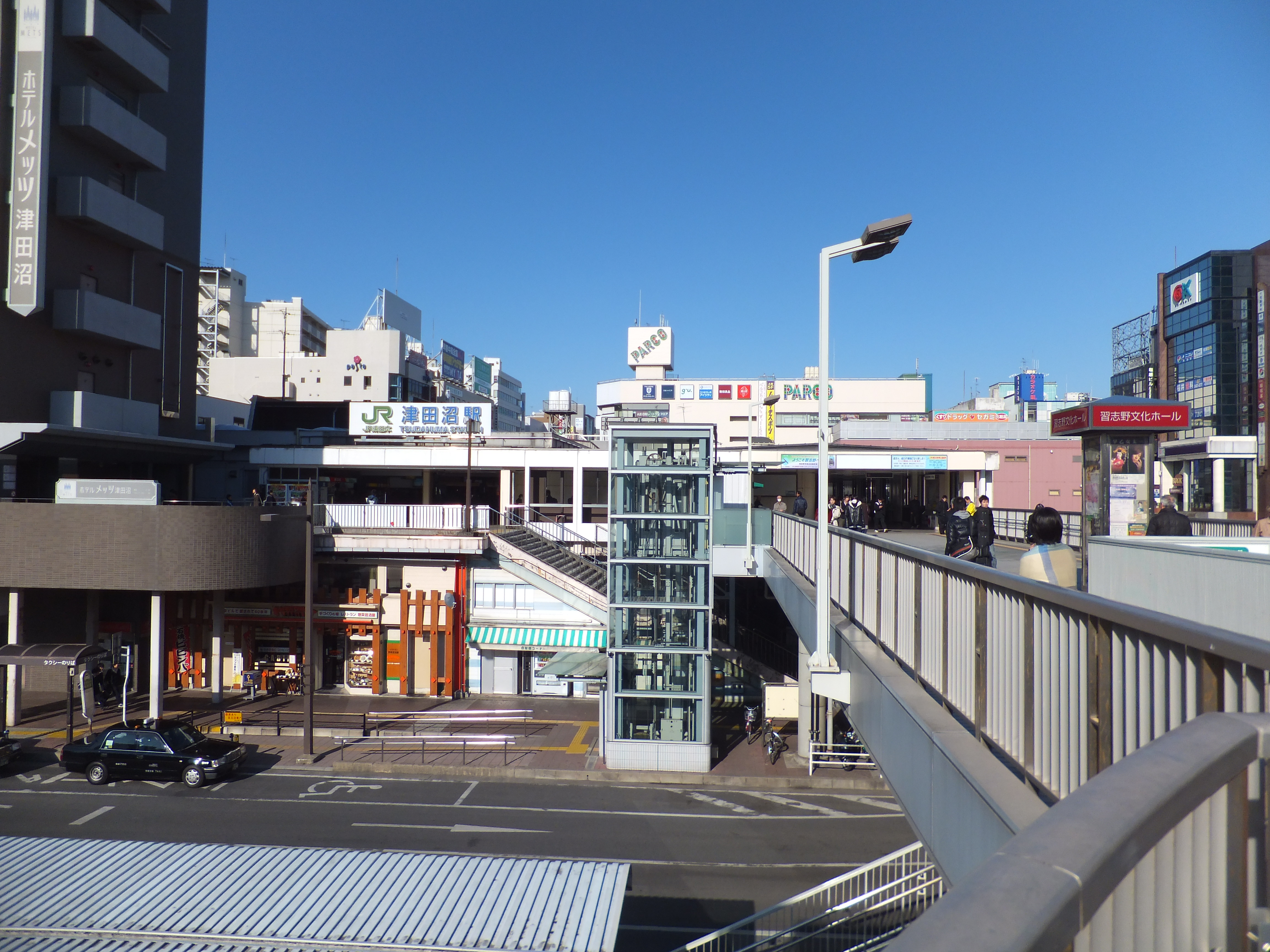 津田沼駅南口